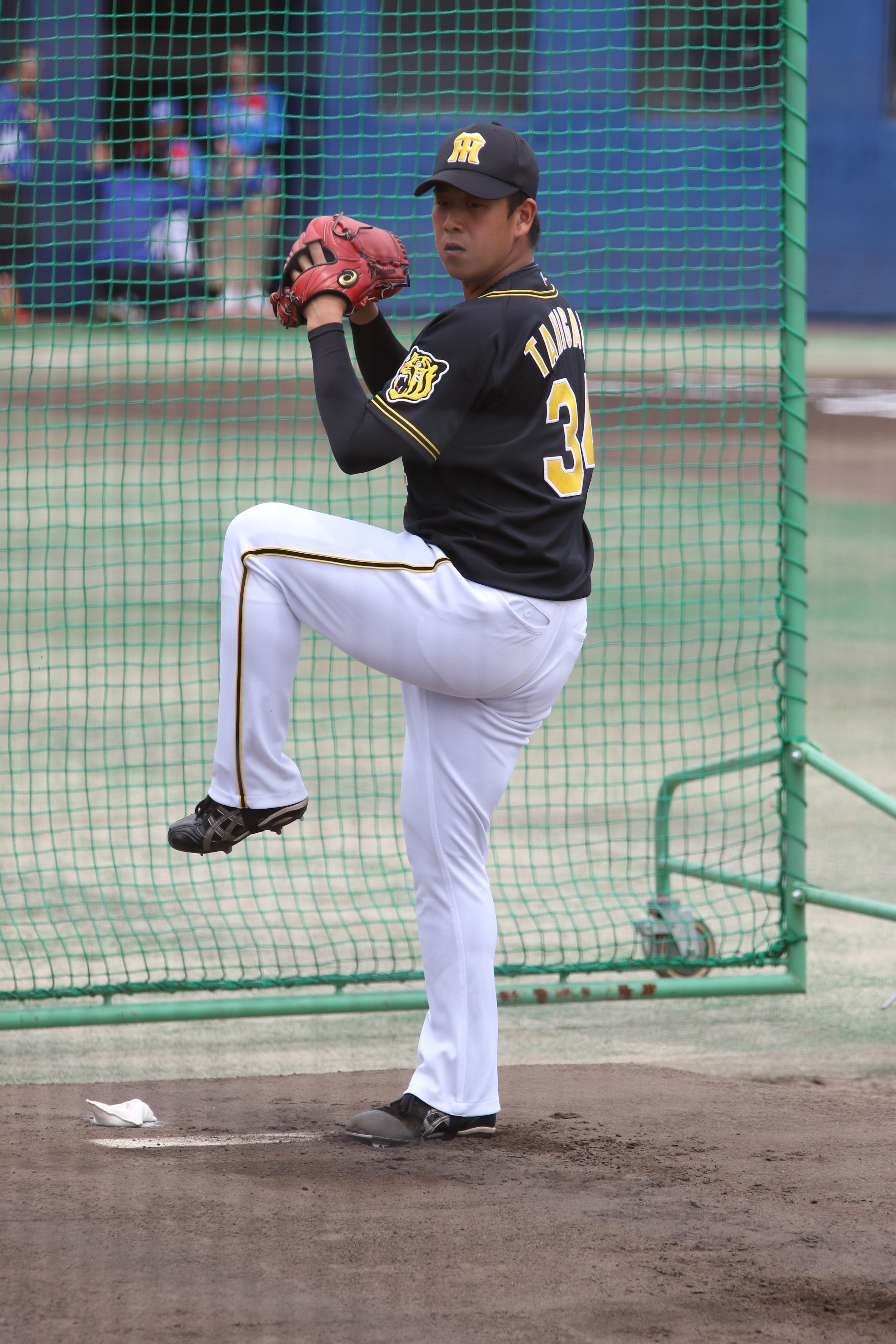 阪神タイガース時代 （2018年5月26日、ナゴヤ球場にて）